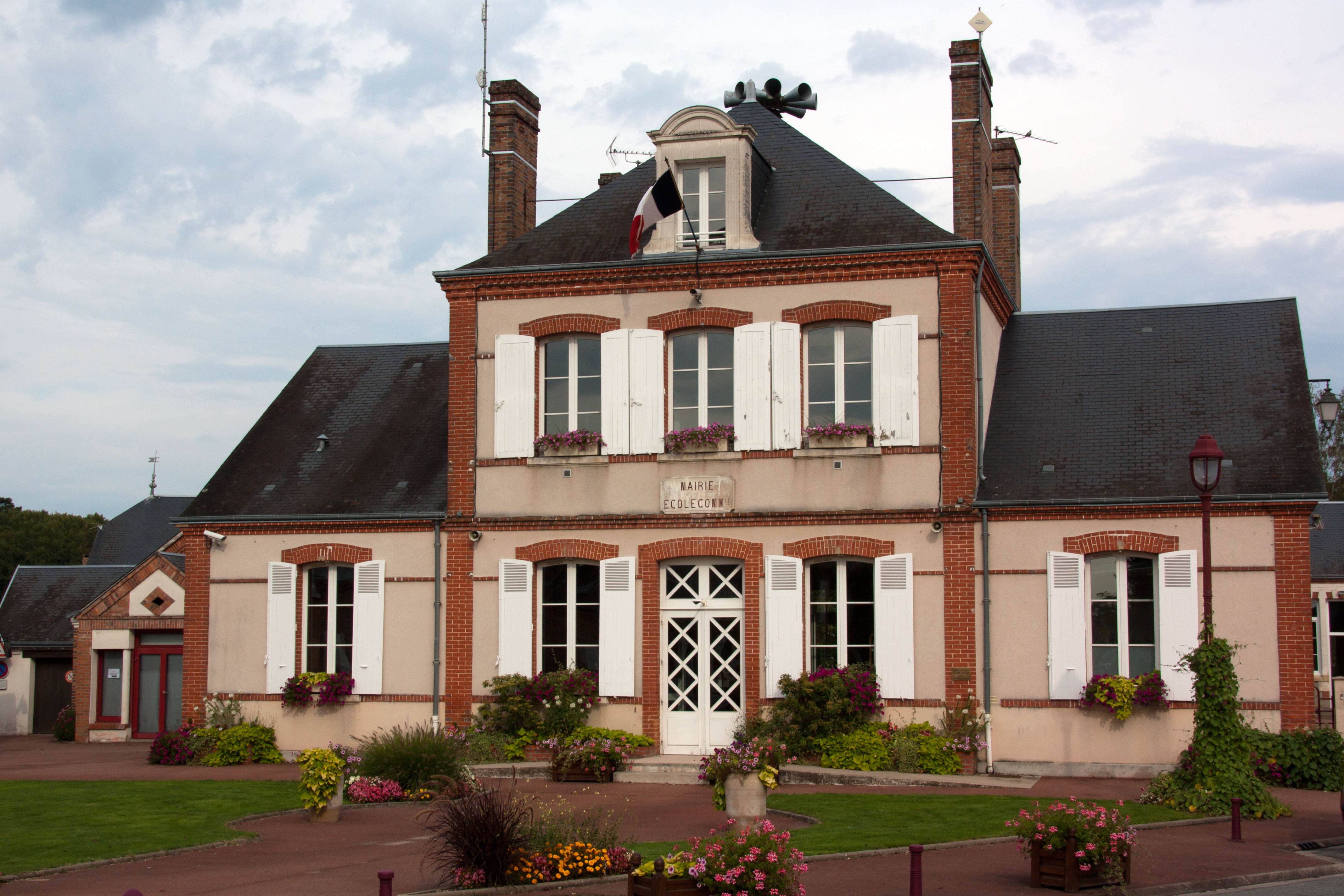 Mairie de Nouan-le-Fuzelier, Nouan-le-Fuzelier, Loir-et-Cher, France